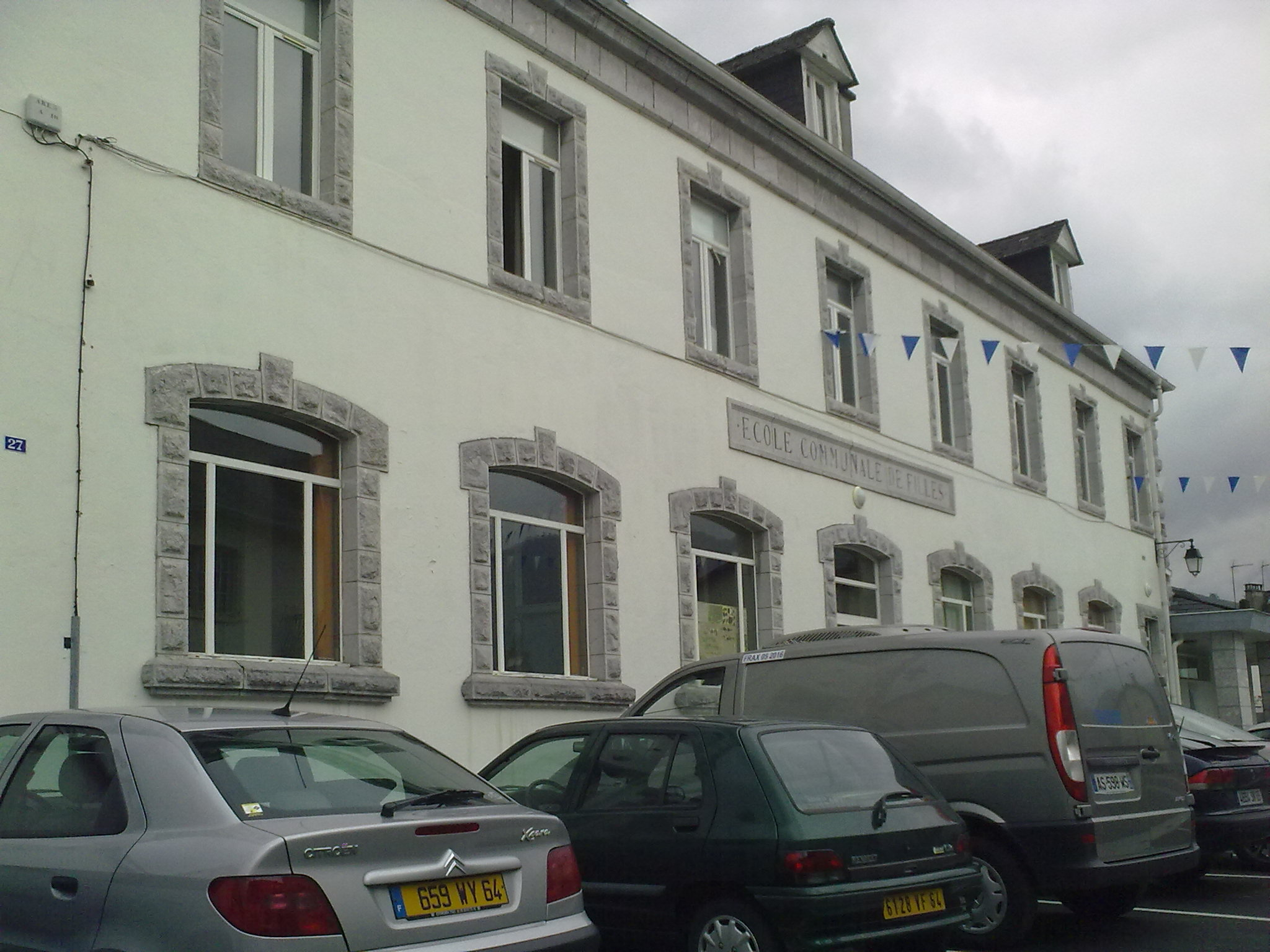 Arette le 4 juillet 2010.